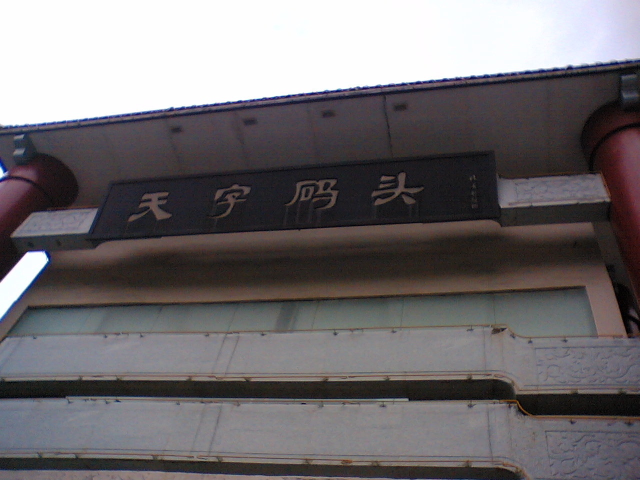 天字码头上的牌匾